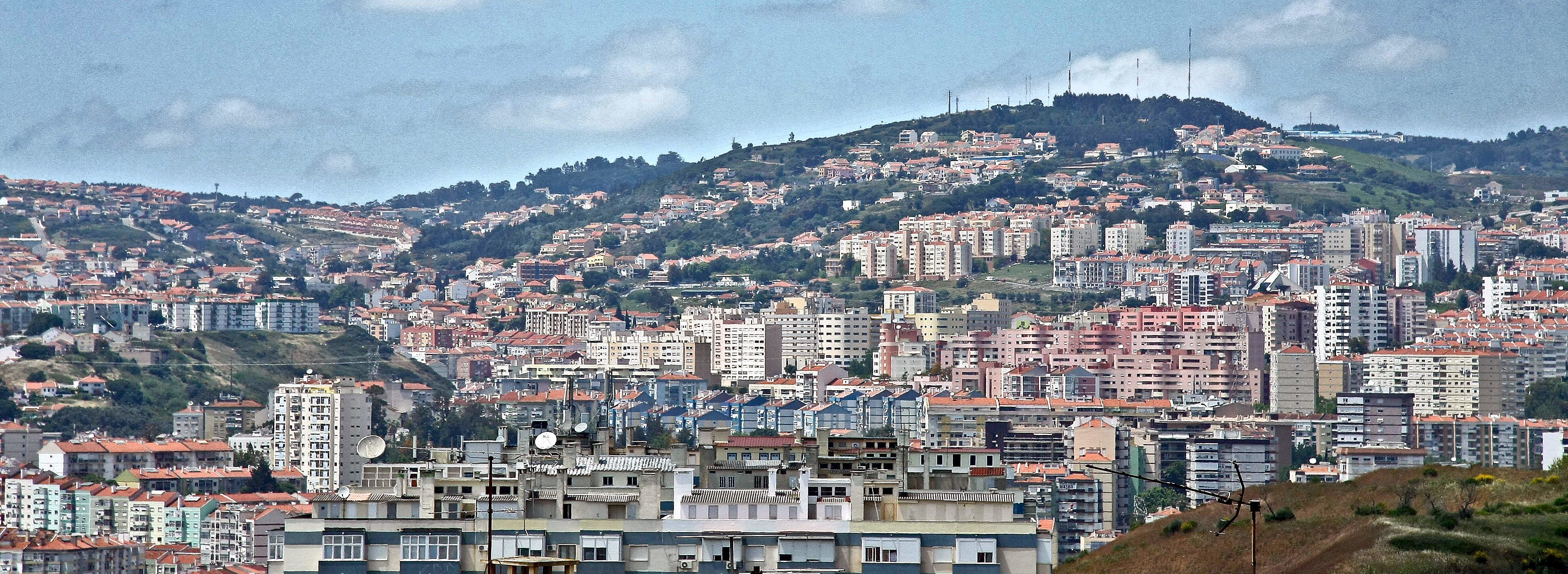 Odivelas - Portugal 🇵🇹